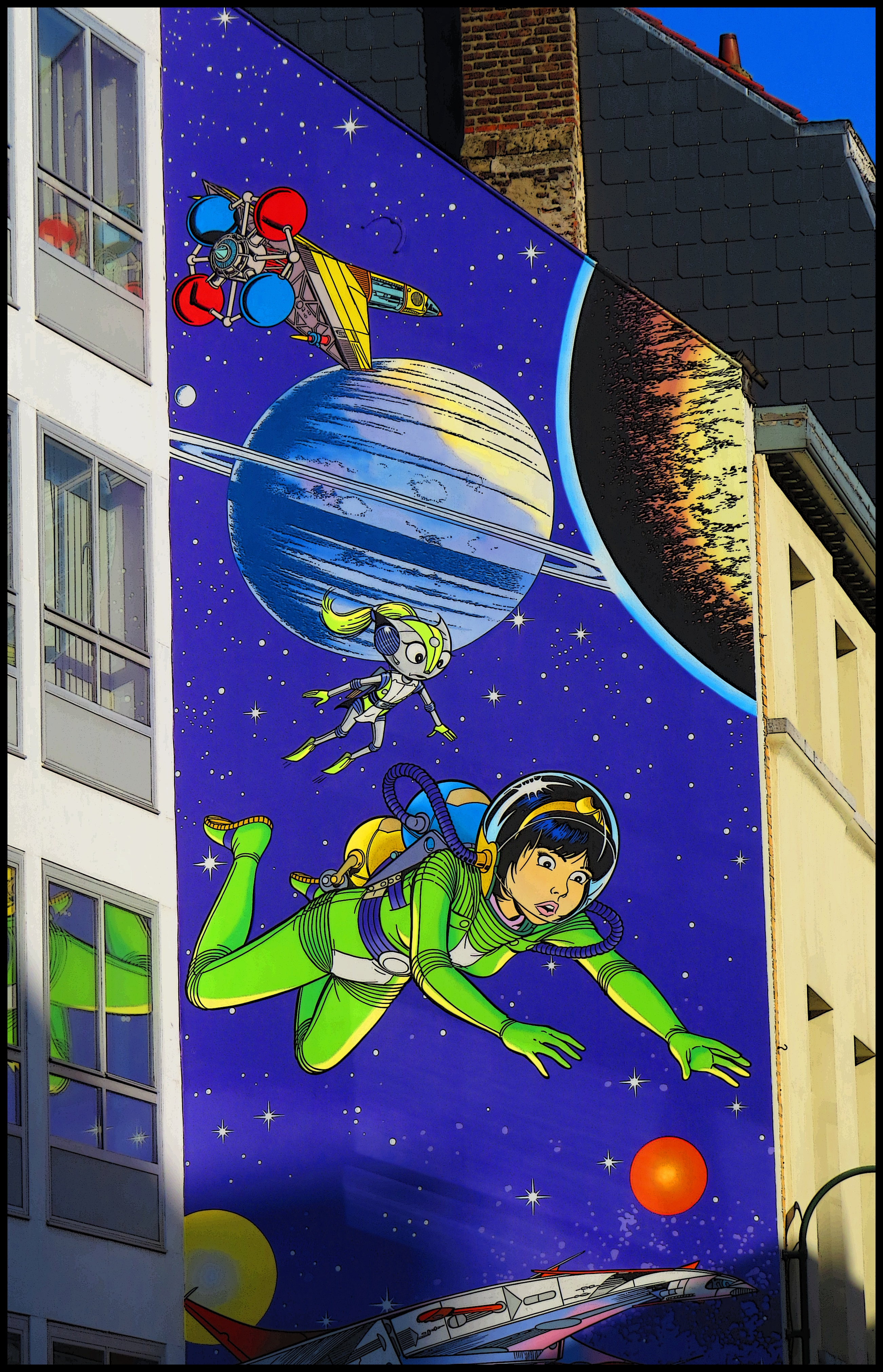 Yuko Tsuno Comic Mural